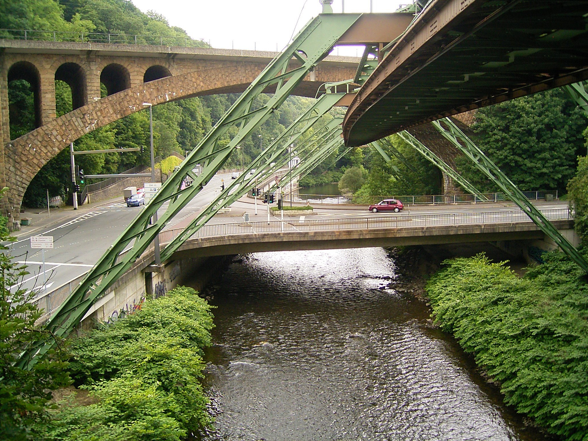 Sonnborner Eisenbahnbrücke und Wupperbrücke Siegfriedstraße in Wuppertal